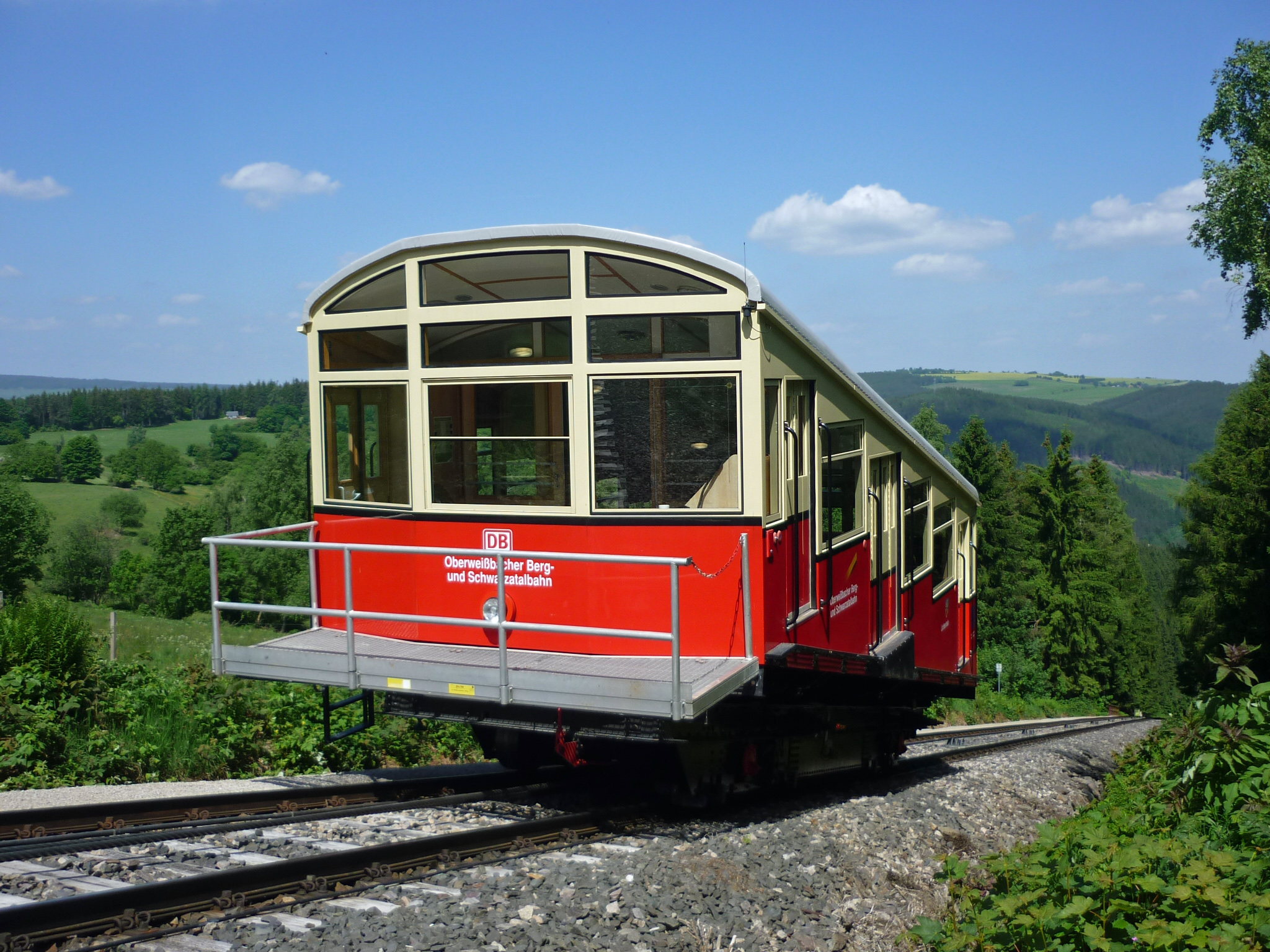 Oberweißbacher Bergbahn, kurz unterhalb der Bergstation Lichtenhain